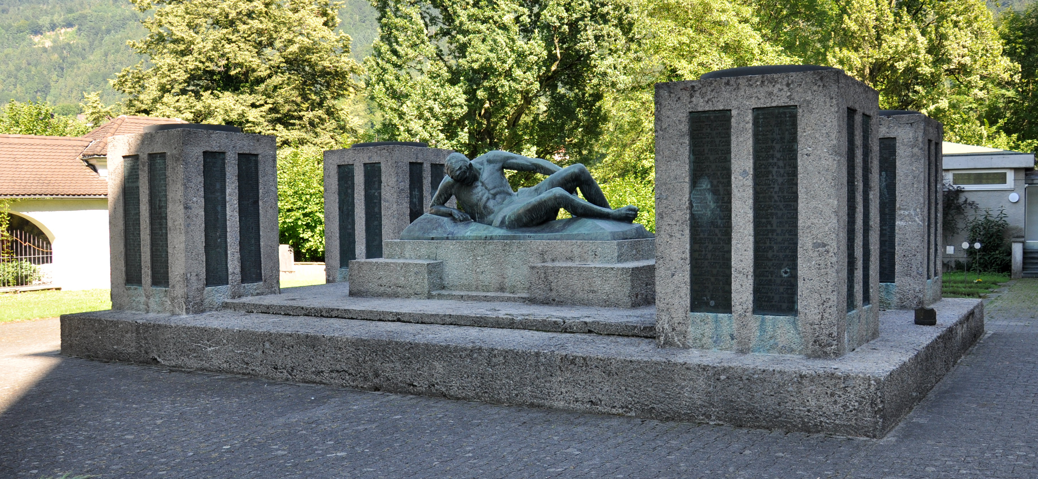 Bregenz, Kriegerdenkmal für die Toten des 1. Weltkriegs, 1931, Bildhauer: Albert Bechtold, bei der Stadtpfarrkirche St. Gallus